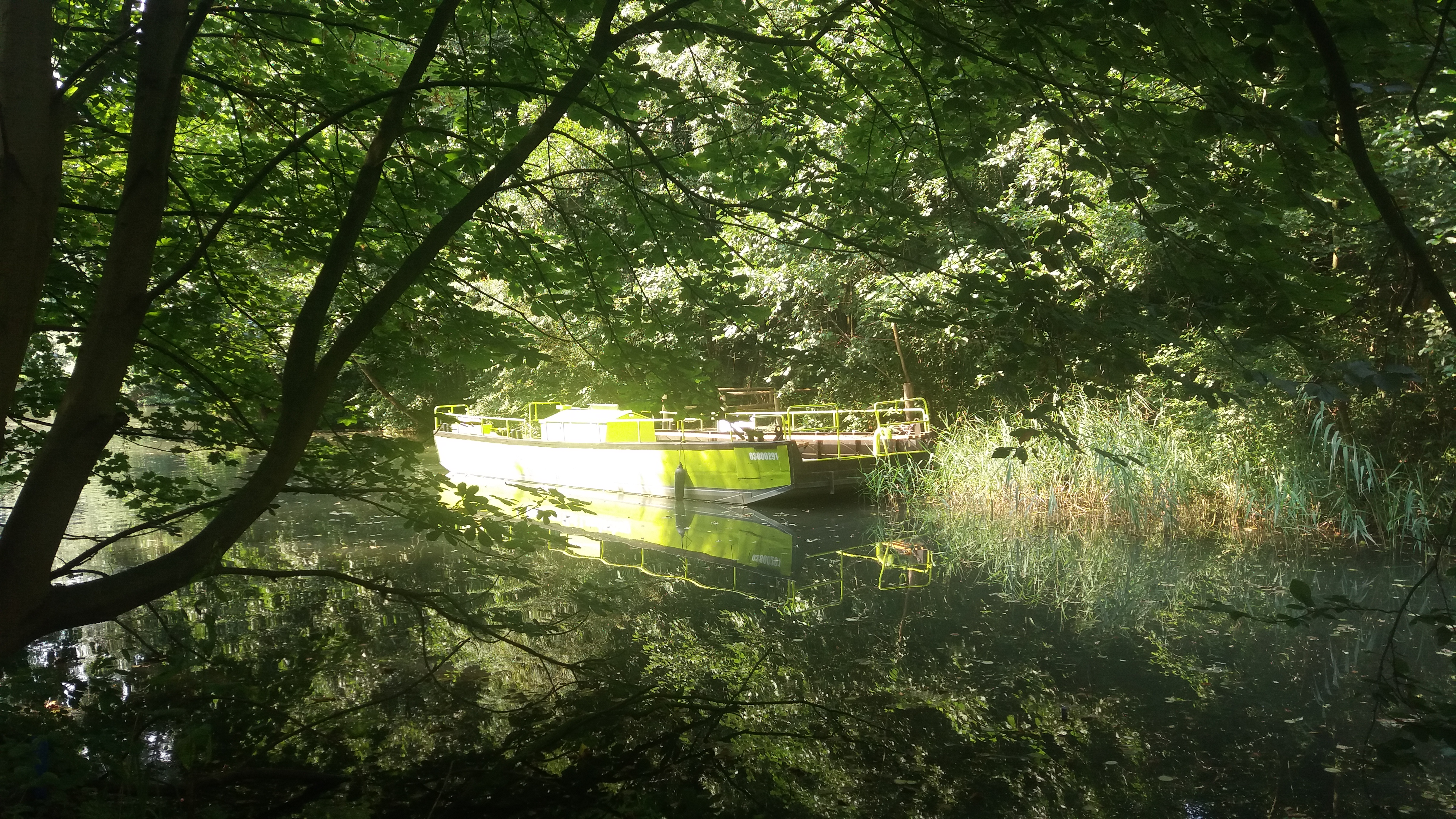 veerboot in dode arm van Kromme Rijn bij Niënhof, Bunnik